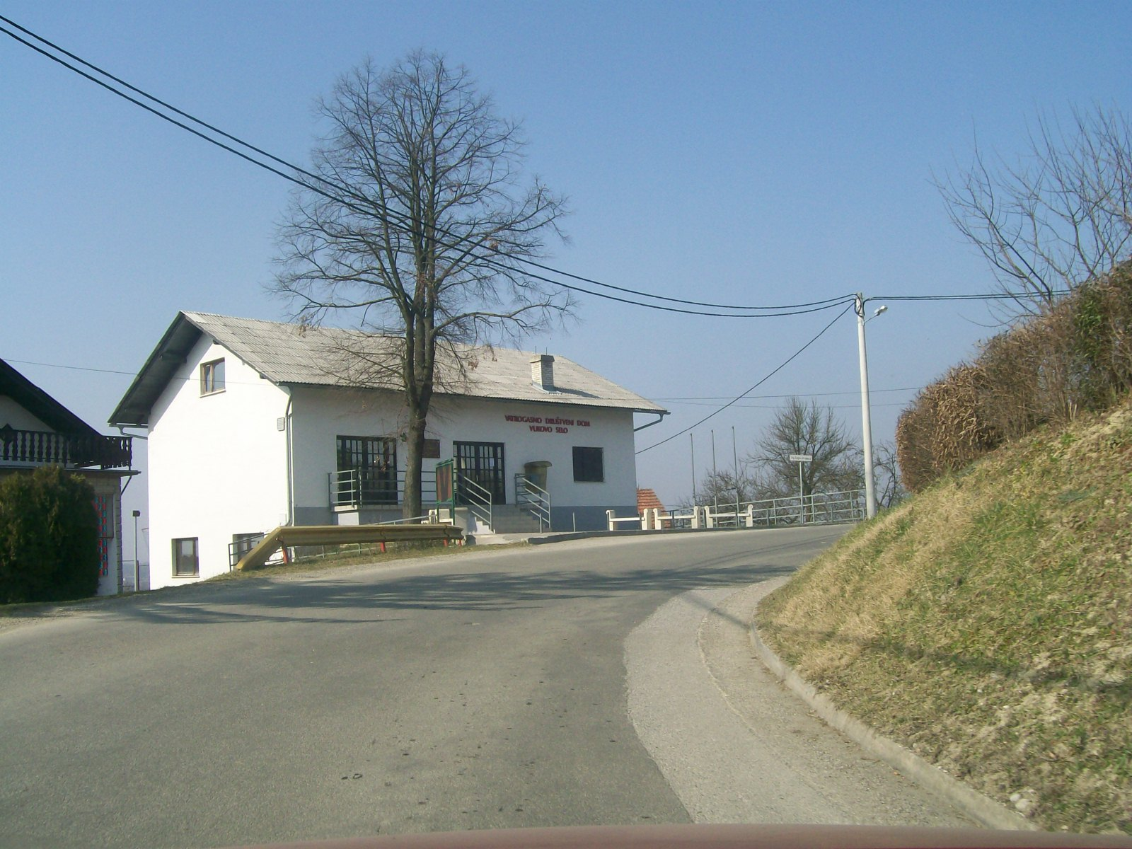 Vukovo Selo (općina Brdovec, ZG županija) - Vatrogasni dom u središtu sela